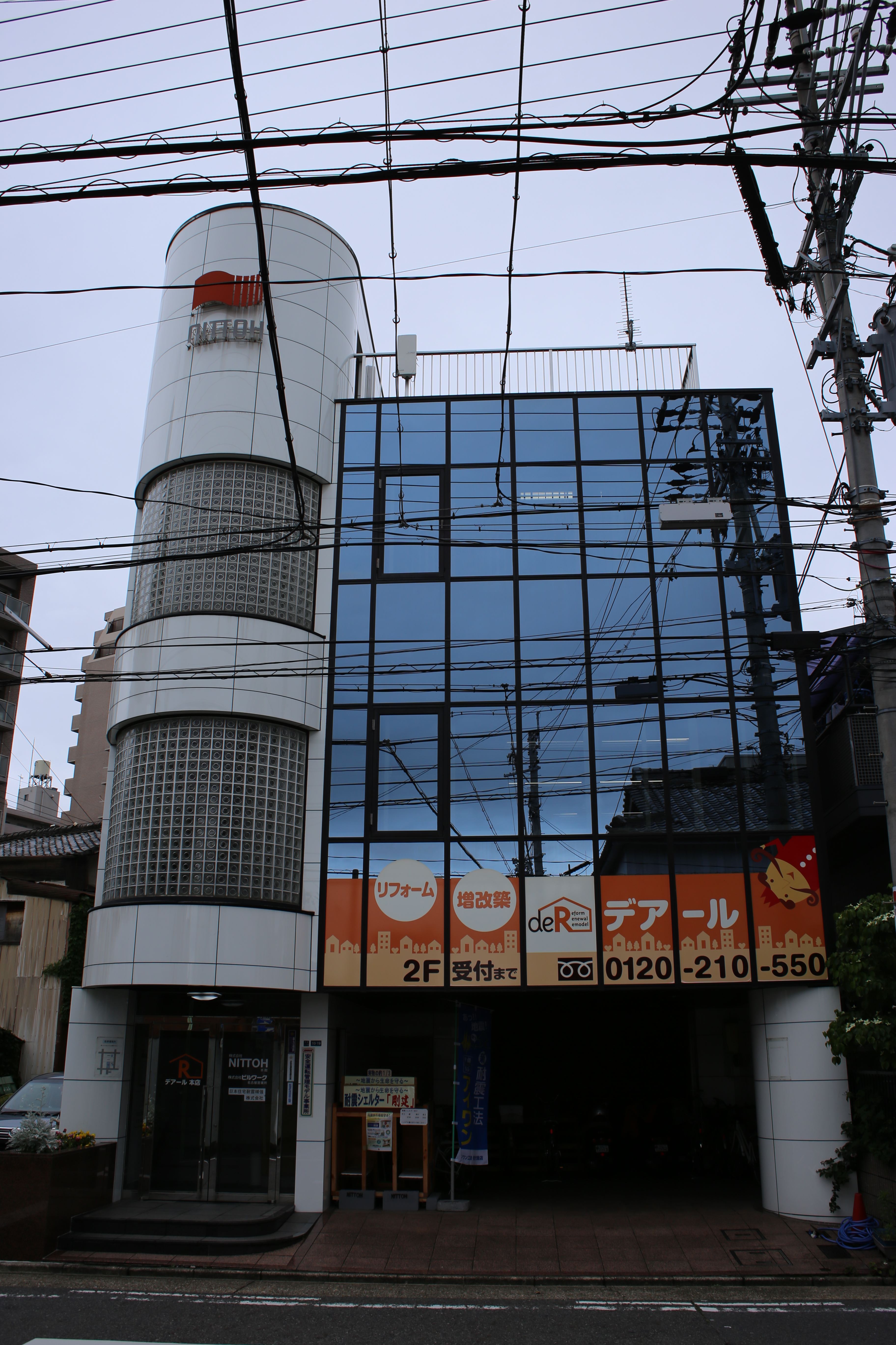 名古屋市北区平安二丁目のNITTOH本社を東側公道より撮影